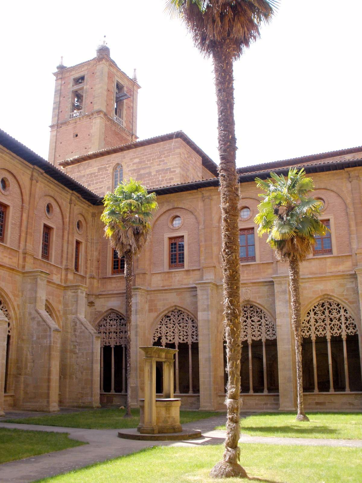 Claustro del Monasterio de Santa María la Real, Nájera (La Rioja, España)